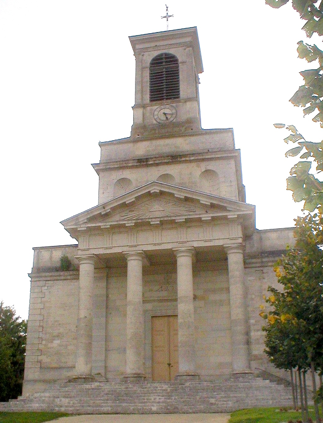 Église de Grancey-sue-Ource (Côte d'Or, France)